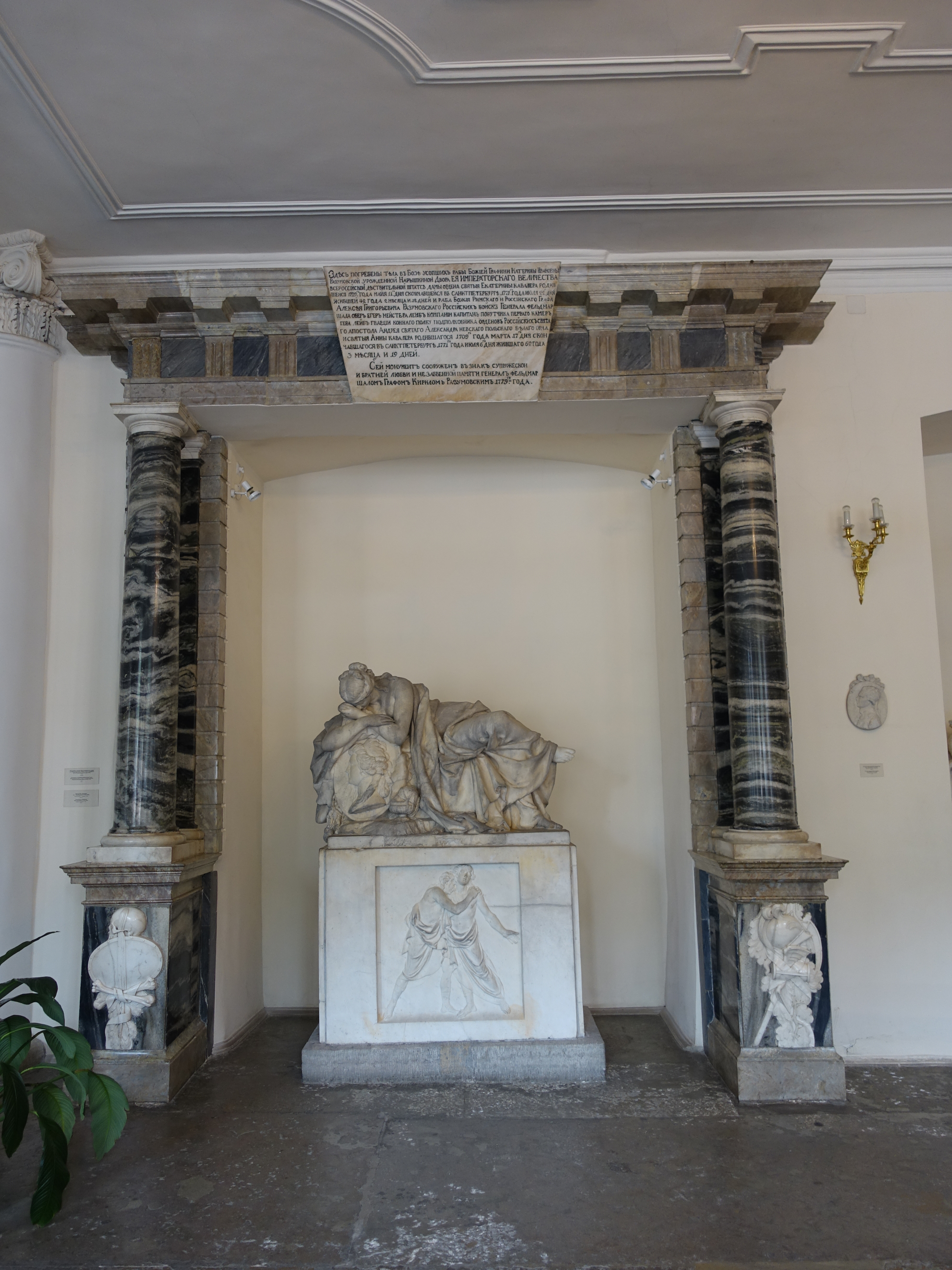 Надгробные плиты А.Г.Разумовского с невесткой в Благовещенской церкви Александро-Невской лавры